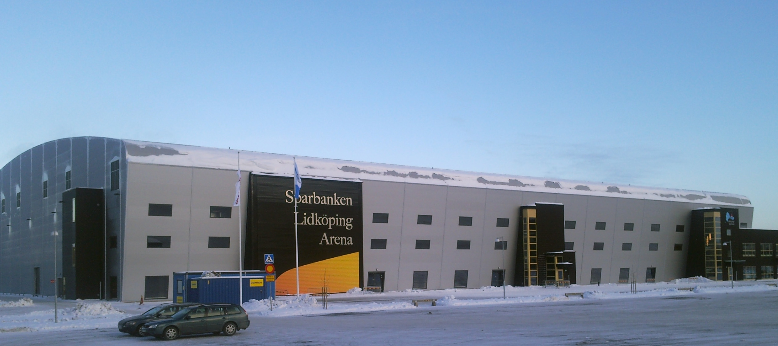 Sparbanken Lidköping Arena i Lidköping sedd från sydväst.